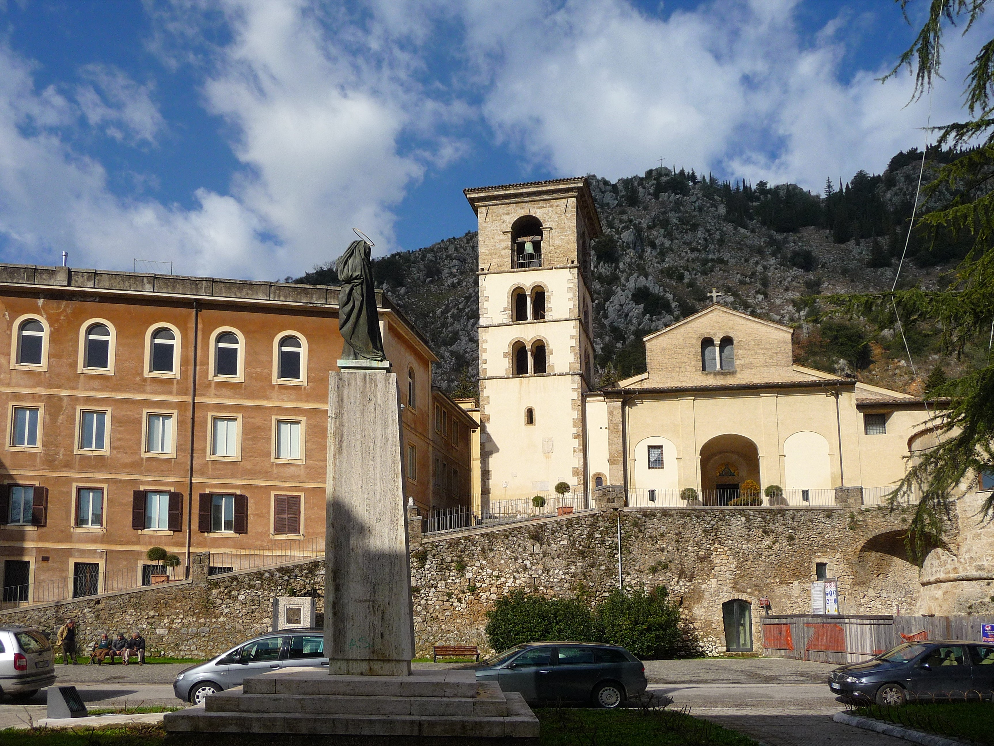 Chiesa Curia Vescovile